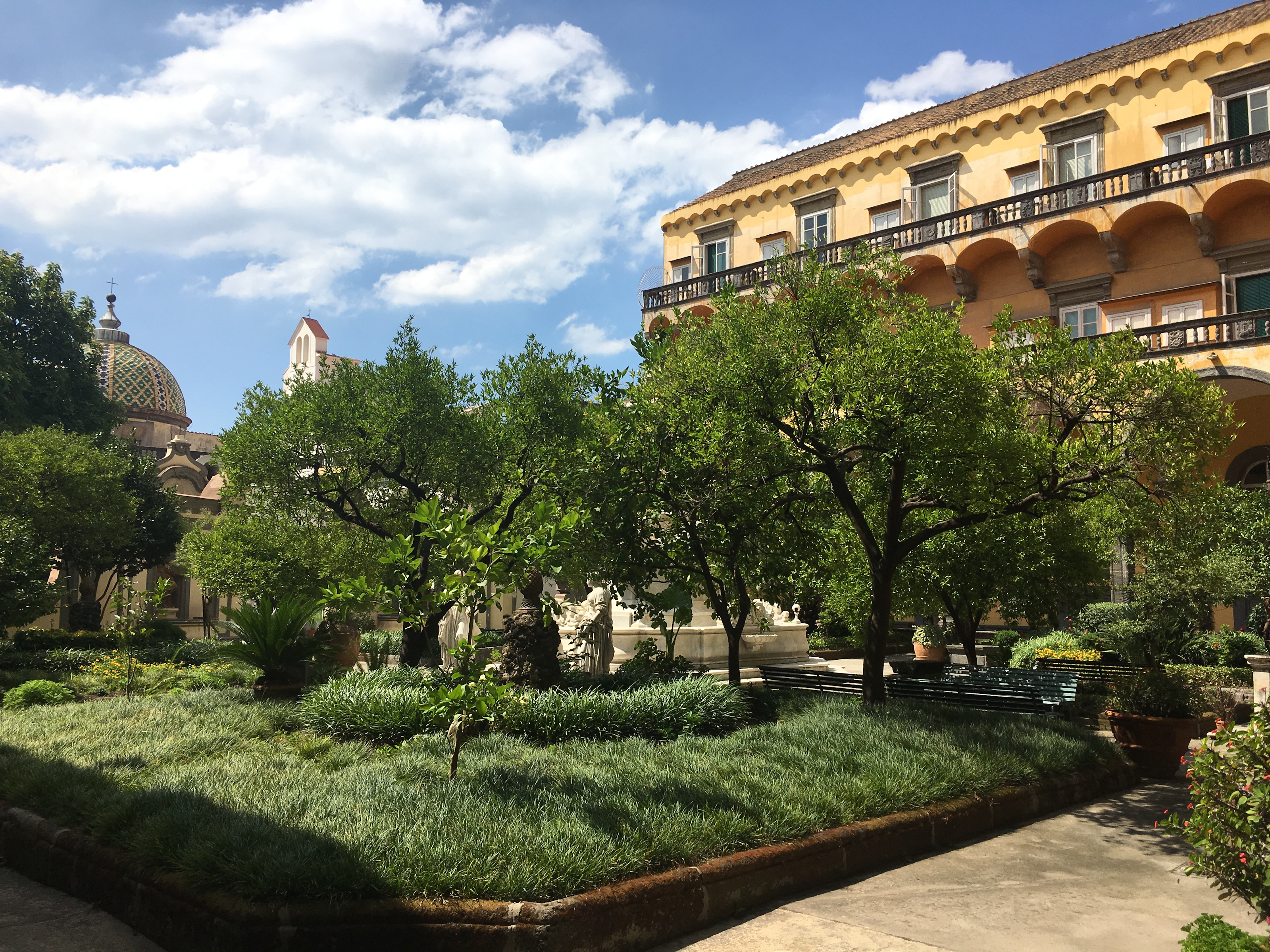 Chiostro di San Gregorio Armeno (Napoli)